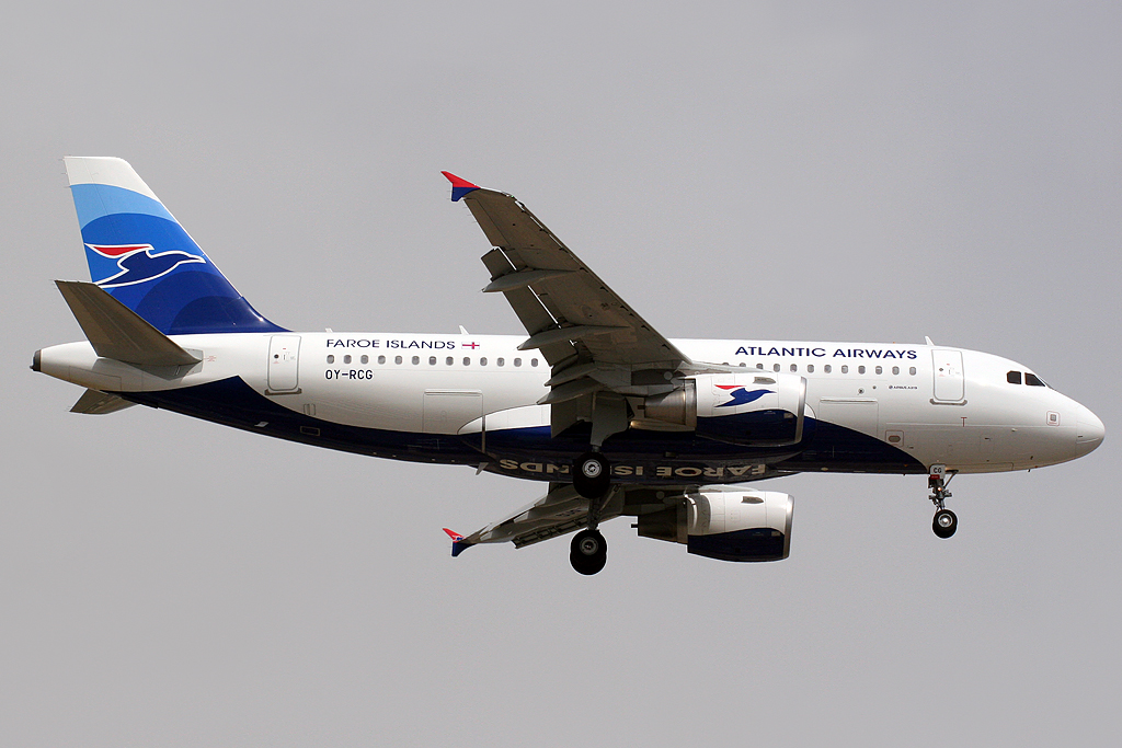 Barcelona El Prat (LEBL/BCN) Airport